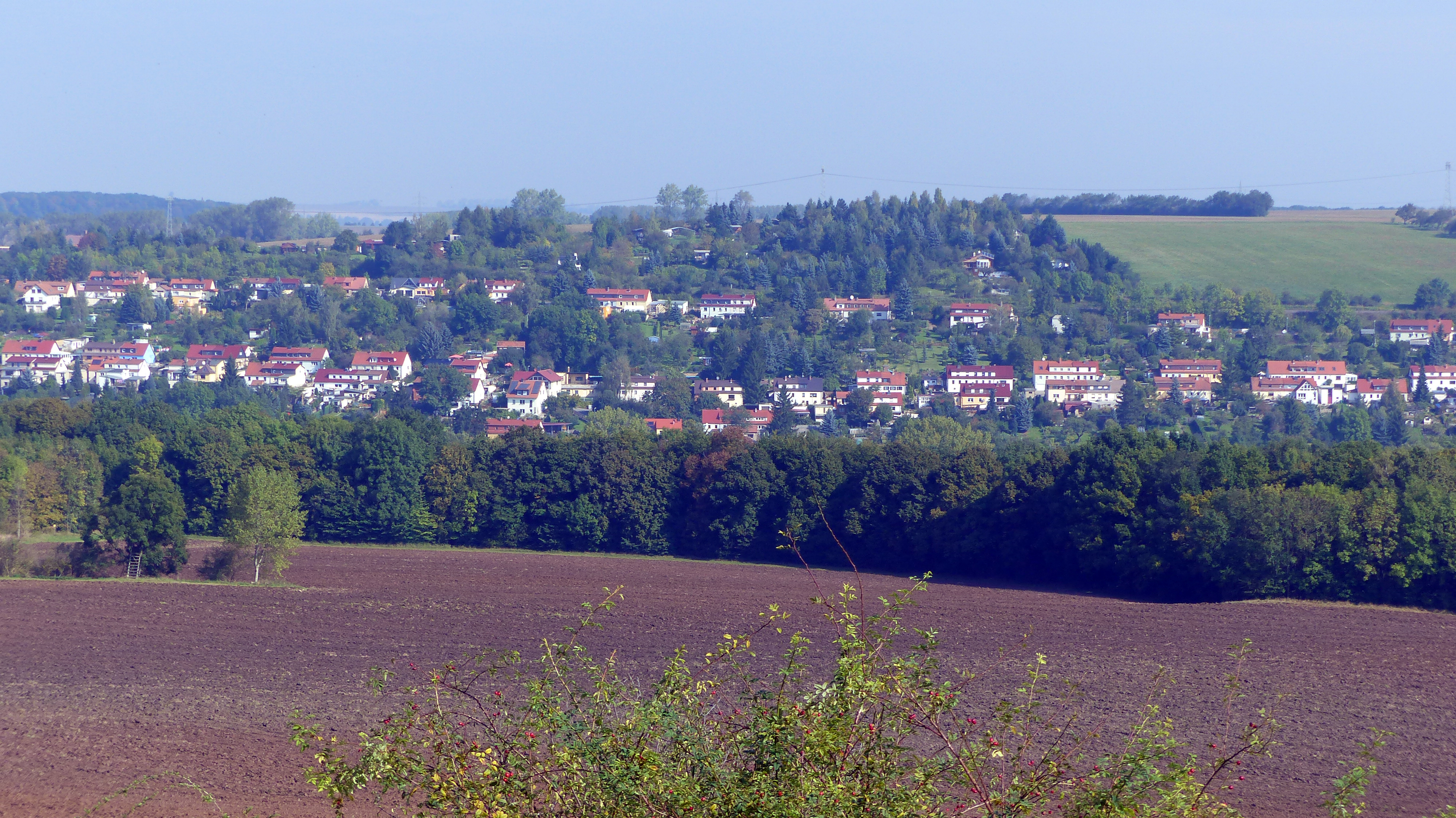 Blick auf Oberweimar Süd vom Schloss Belvedere aus